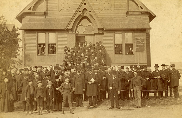 Les membres de la Conférence Générale de Minnéapolis en 1888